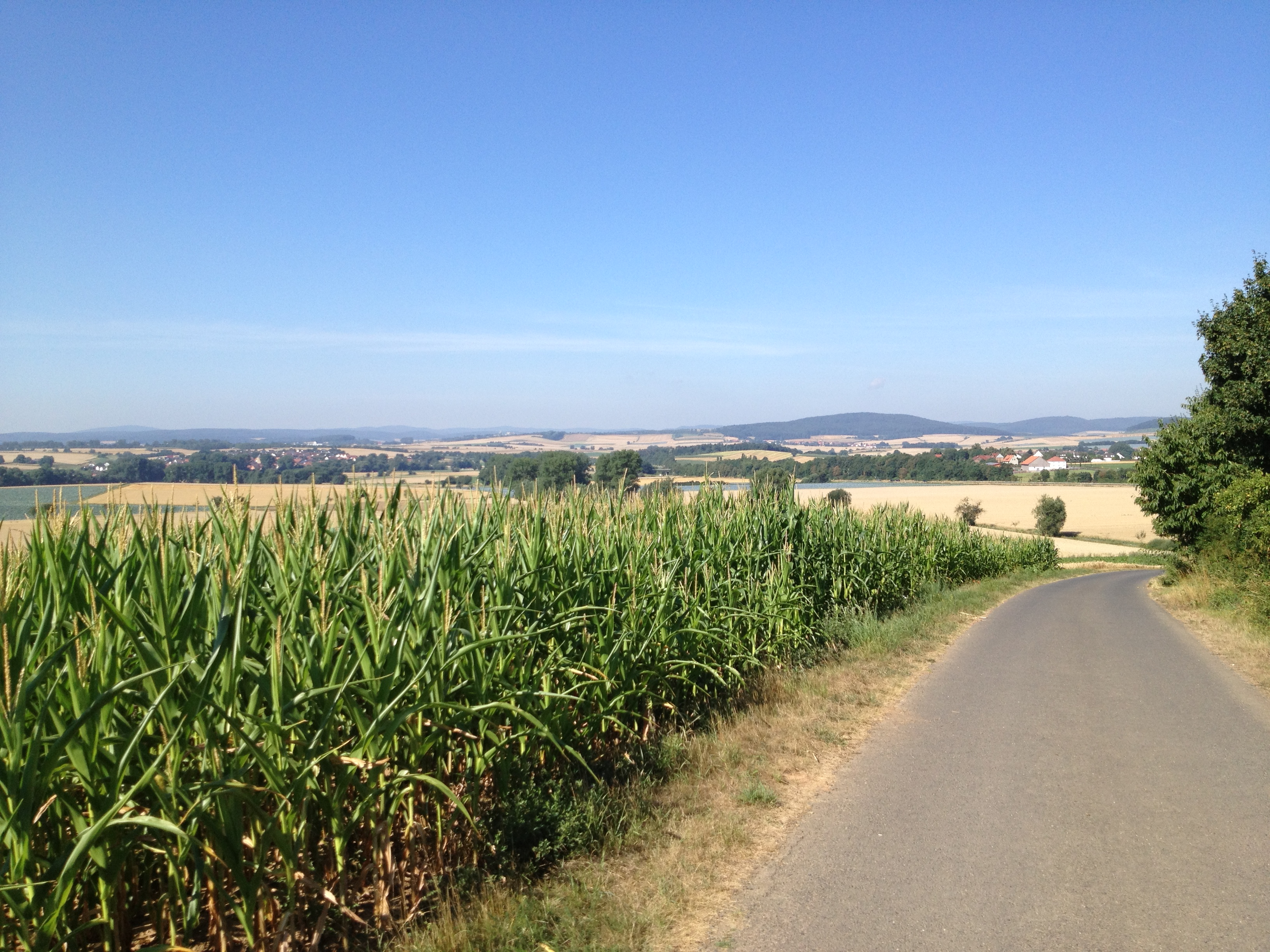 Rückblick vom Chattengauweg auf dem Gudensberger Nacken Richtung Westen